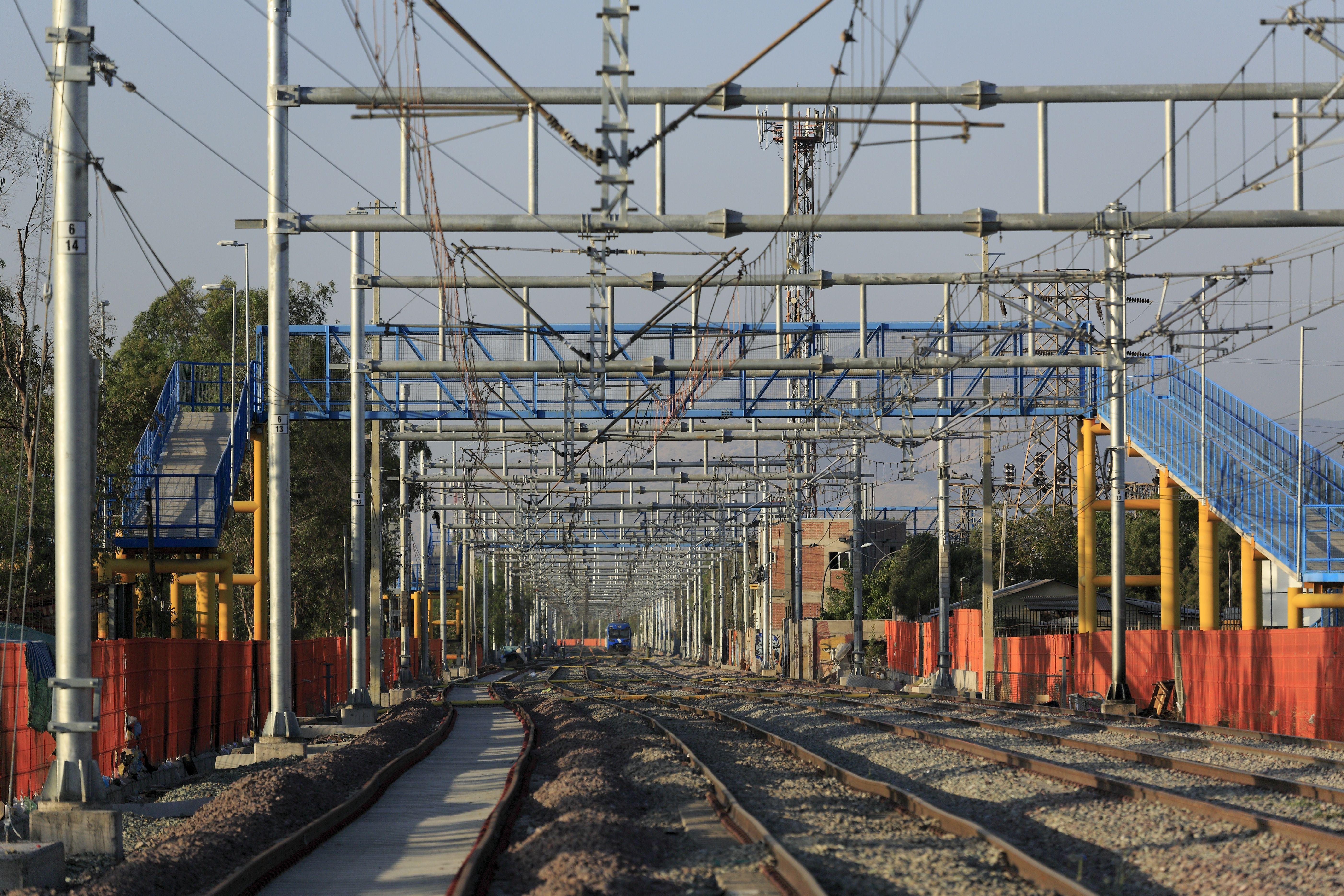 Von der Höhe des Rohbaubahnsteiges Lo Espejo Richtung Norden. Der Stahlbetonbau rechts gehört zum Unterwerk Lo Espejo, im Hintergrund der (einzige) Schnellzug Chillán–Santiago. Nur das zweite Gleis von rechts ist in Betrieb.Im Zug der Ausbauarbeiten für »Metrotren Nos« auf vier Gleise wurden zahlreiche Fußgängerbrücken gebaut, doch zum aufnahmezeitpunkt sind sie durchgehend abgesperrt. Bei nur sechs täglichen Zugfahrten auf einem Gleis ist ihre Nutzung auch kaum vermittelbar.